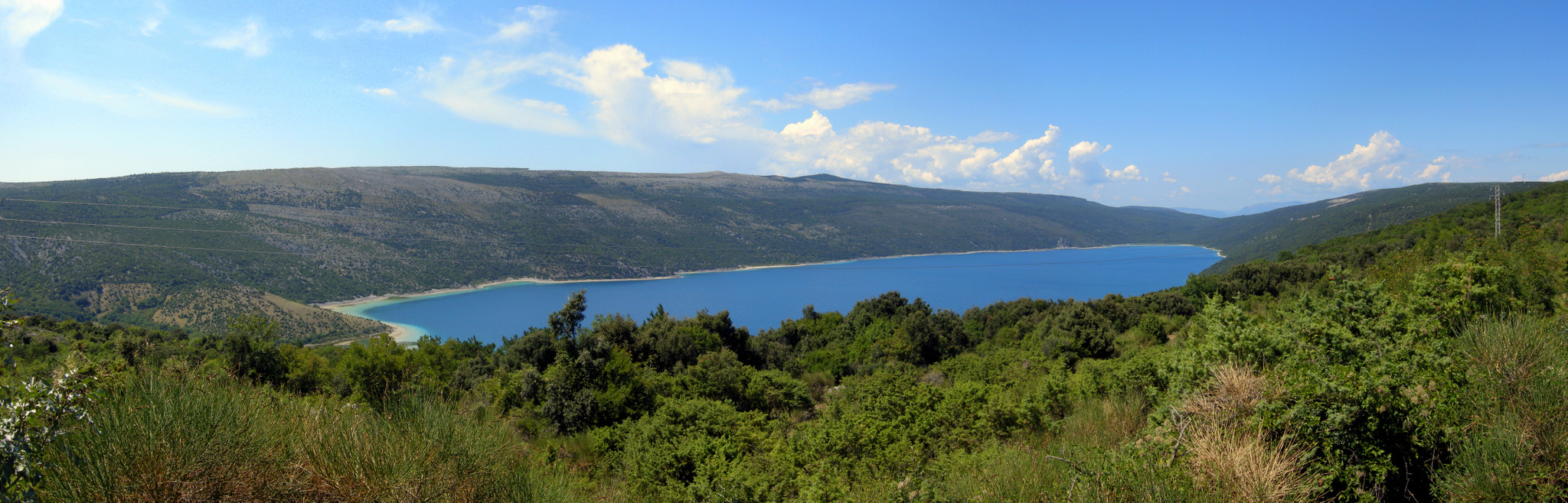 Jezioro Vransko